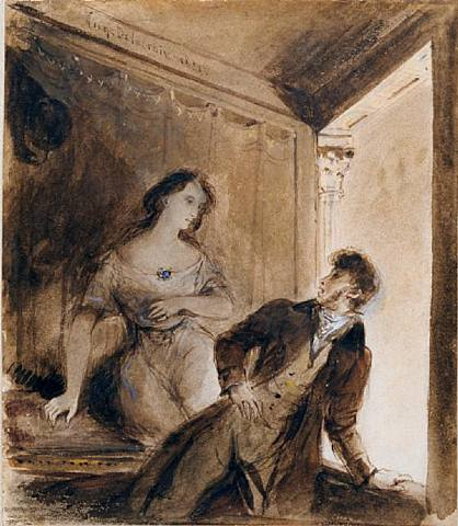 Marie Dorval e Alfred de Vigny, gouache, 55.9 x 45.2 cm, Collezione privata